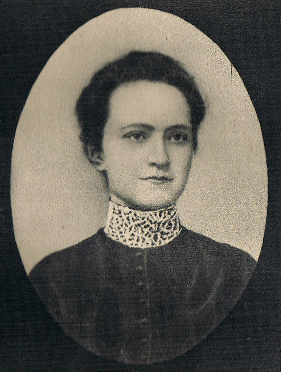 Wanda Krahelska działaczka PPS